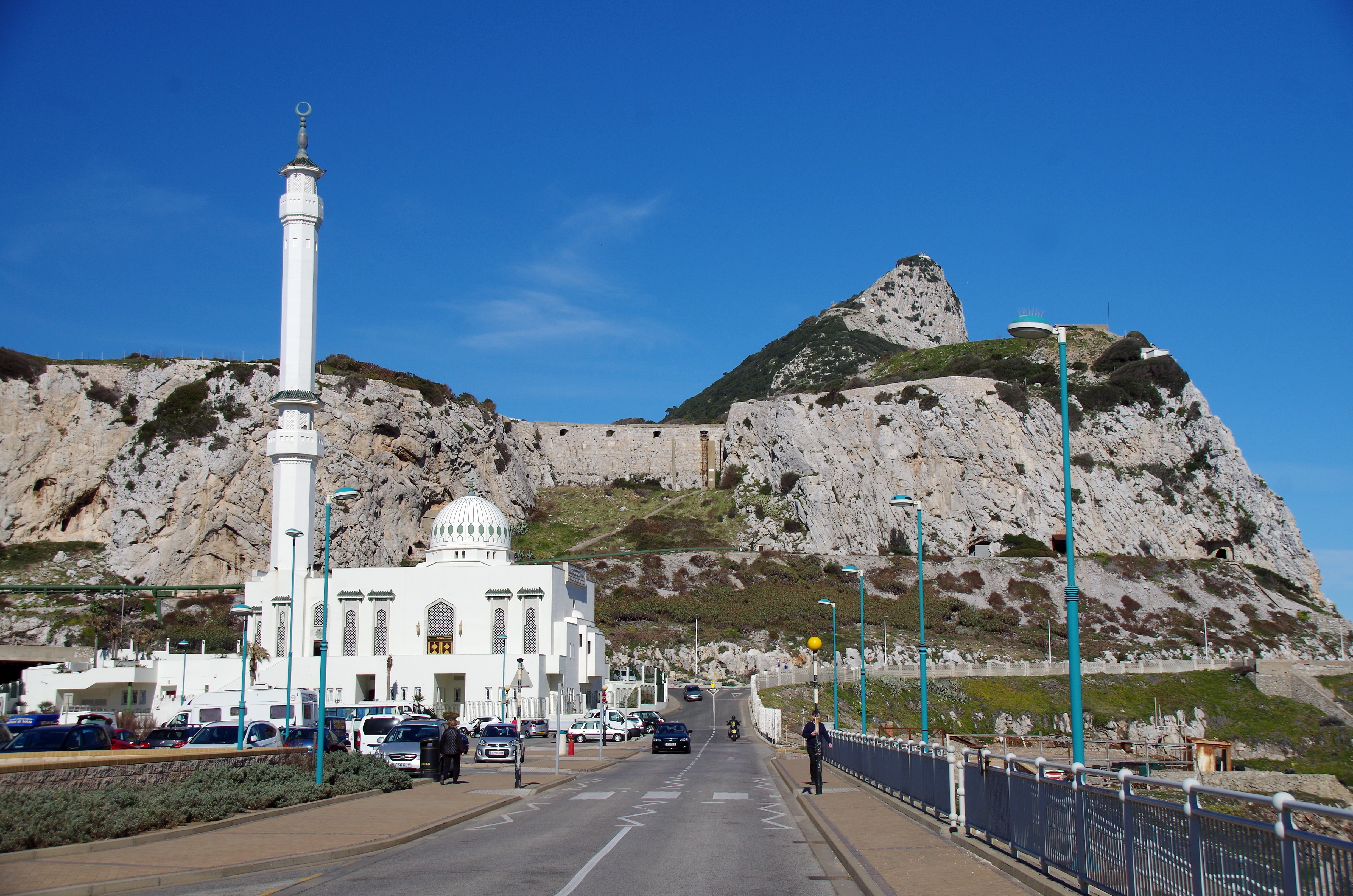 Gibraltar, Moschee an der Südspitze